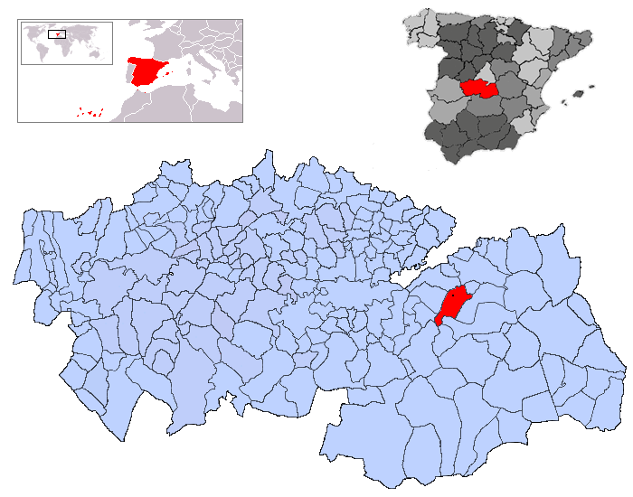 Huerta de Valdecarábanos en la provincia de Toledo.